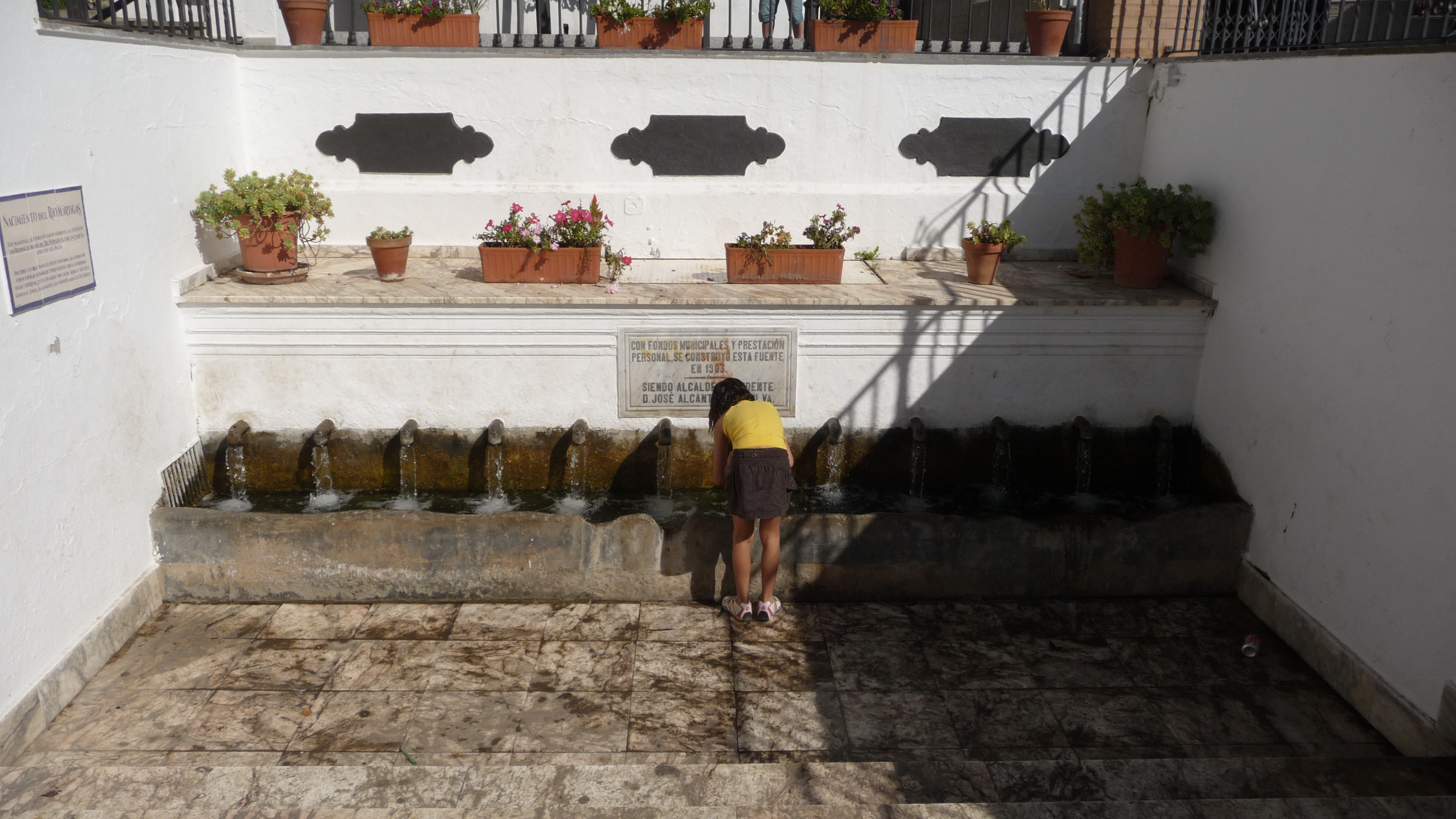 Fuente de los doce caños. Nacimiento del Rió Múrtigas. Fuenteheridos, provincia de Huelva (España)